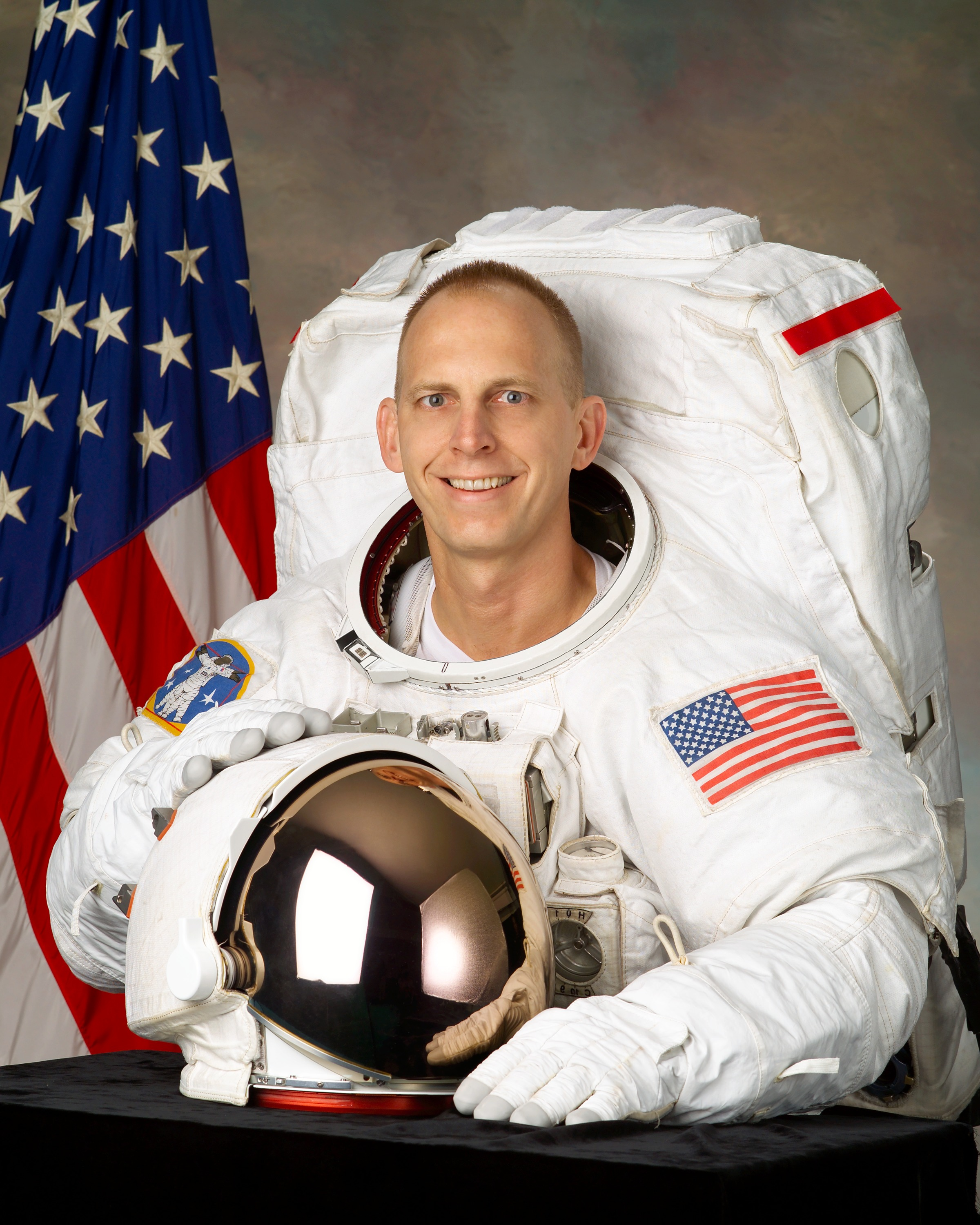 portrait astronaut Clayton Anderson